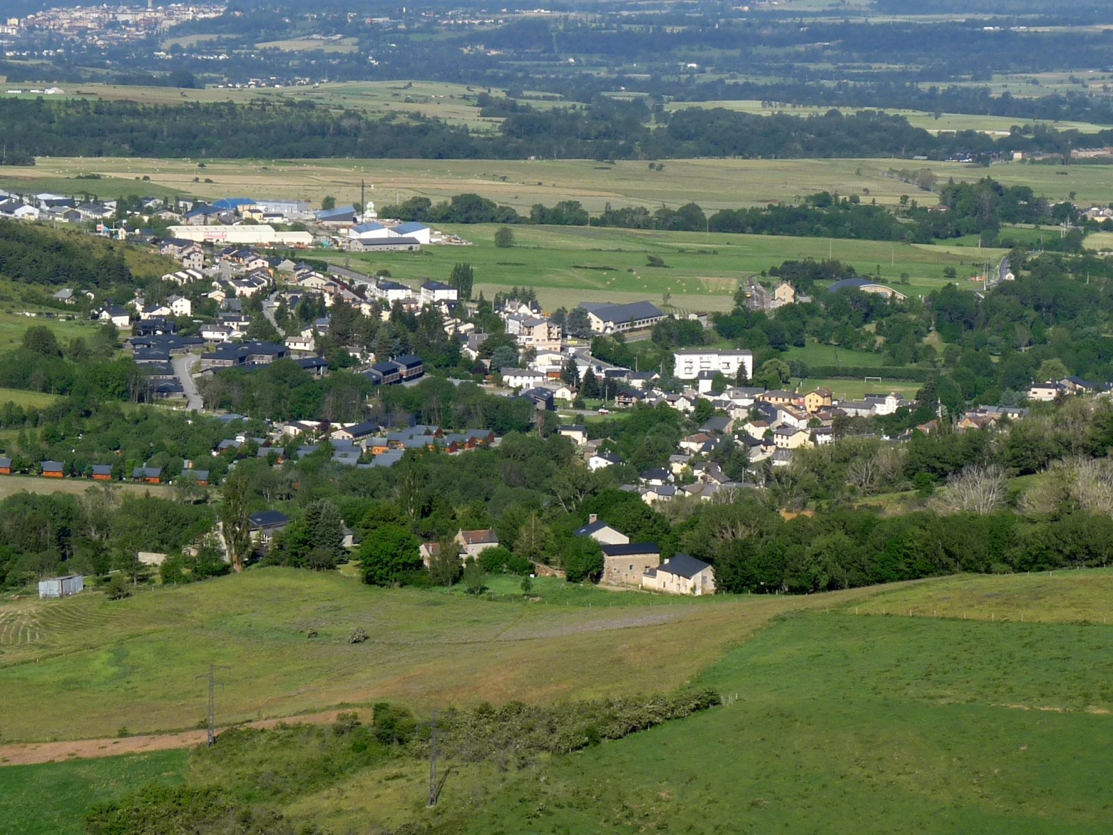 Vue sur Saillagouse depuis la route d'Eyne à Llo, Pyrénées-Orientales, France